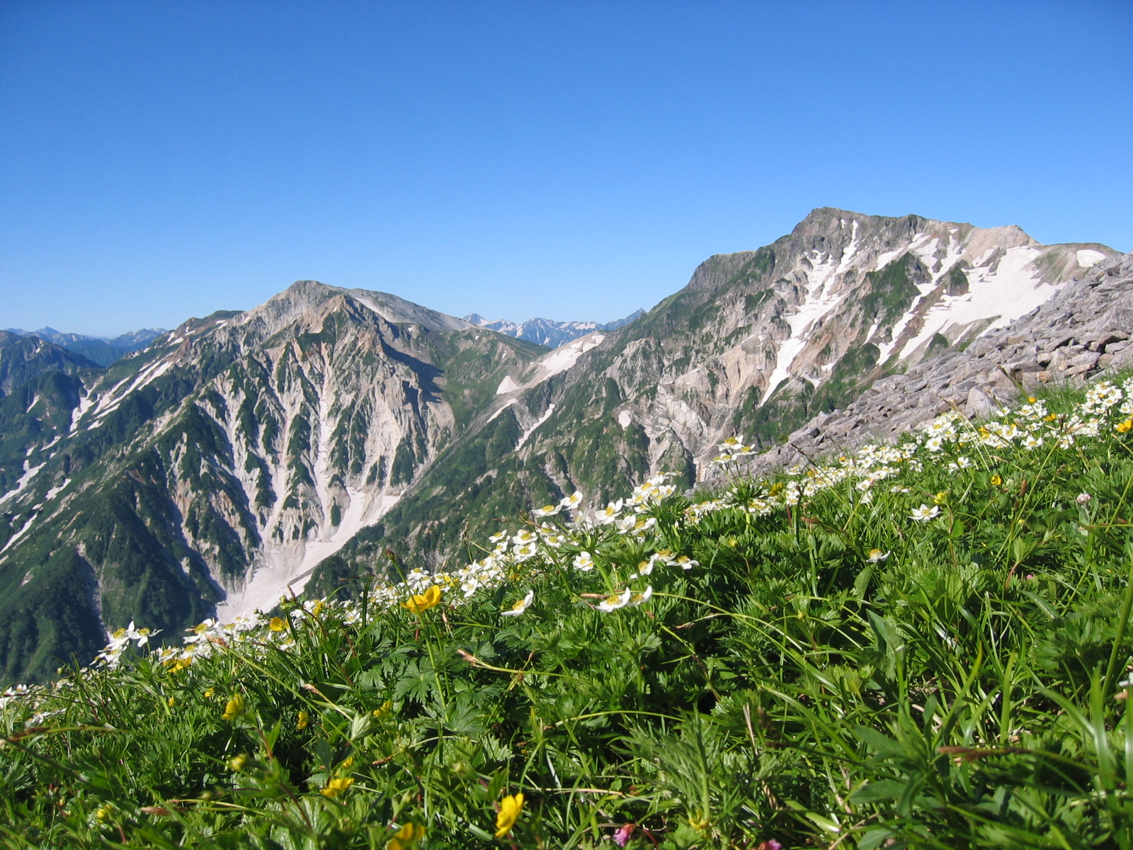 白馬連峰